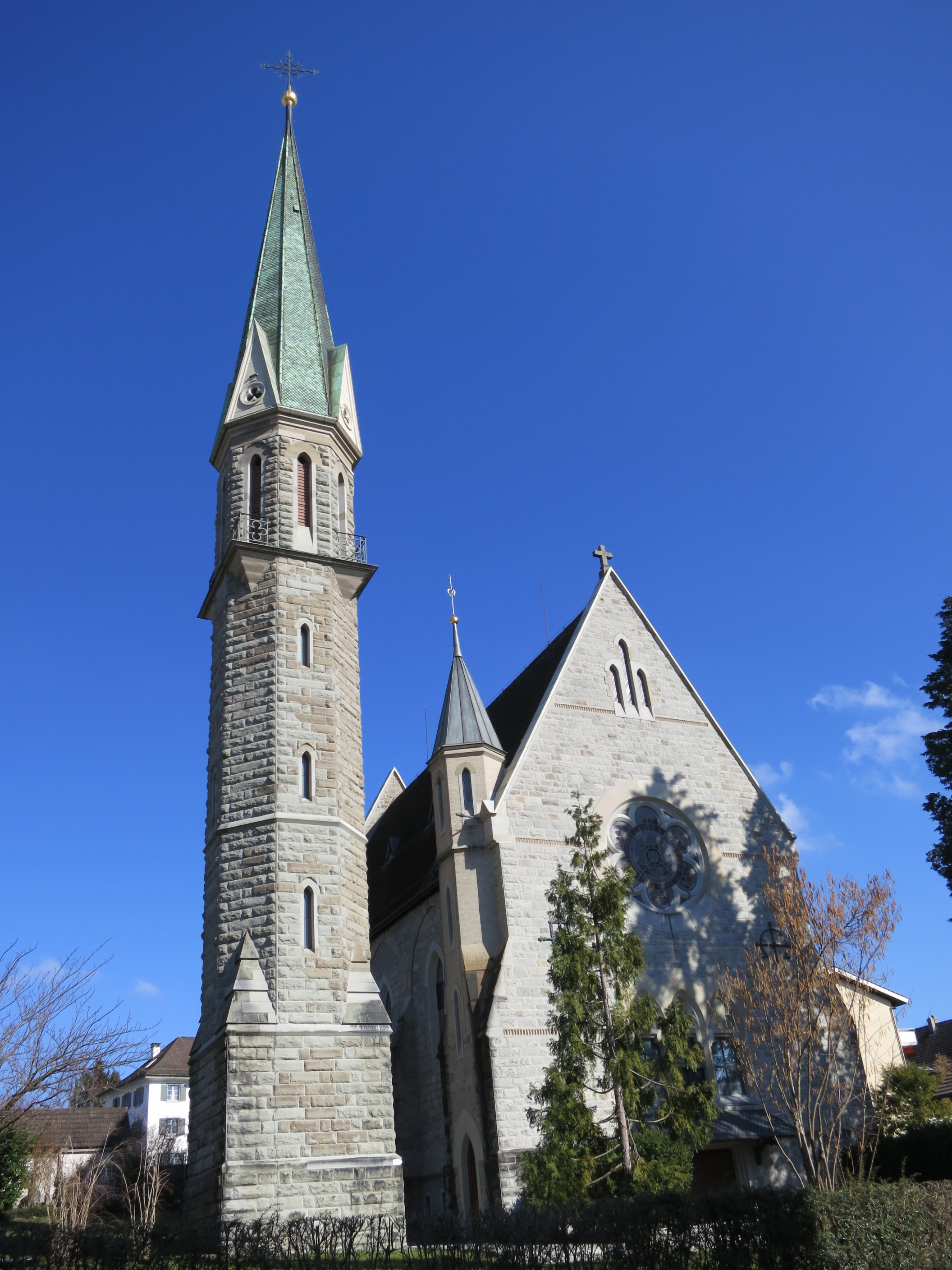 Katholische Kirche, Männedorf ZH, Schweiz